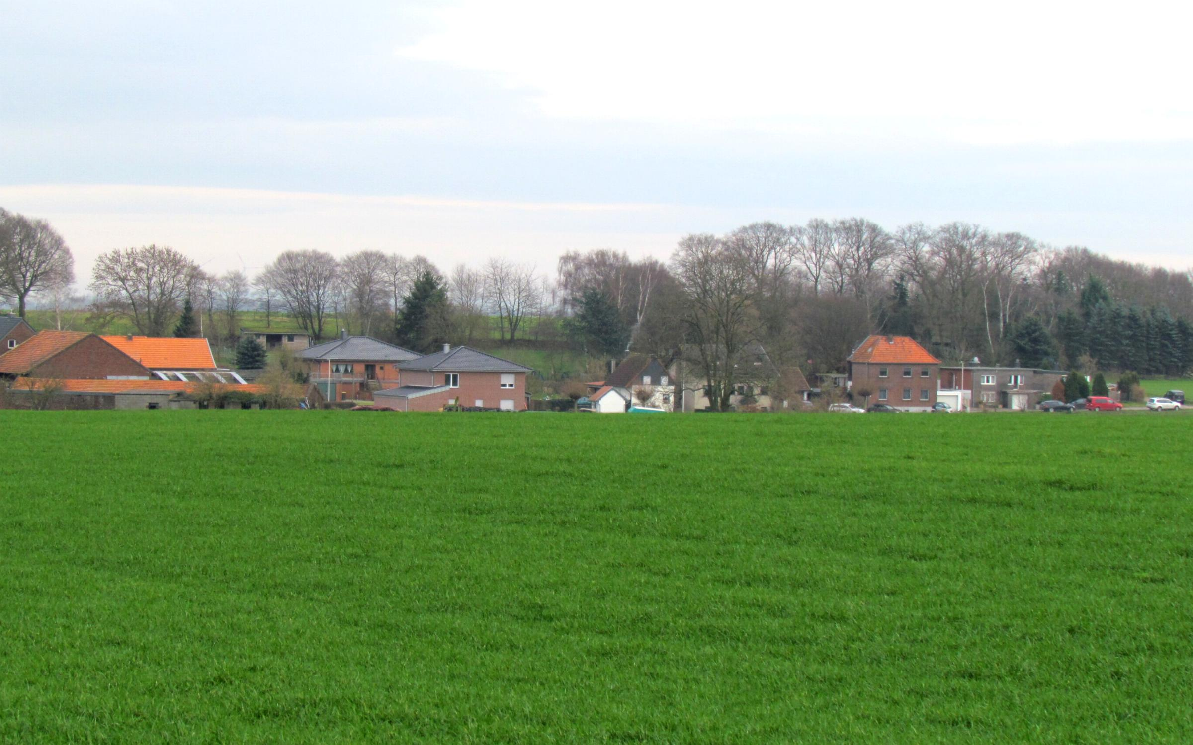 Ortschaft Baumen